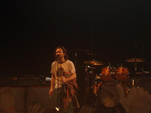 Eddie Vedder, Pearl Jam's singer. Live at Pacaembu Stadium - Sao Paulo, Brazil